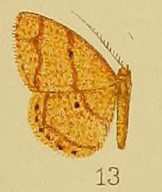 Xenostega fallax